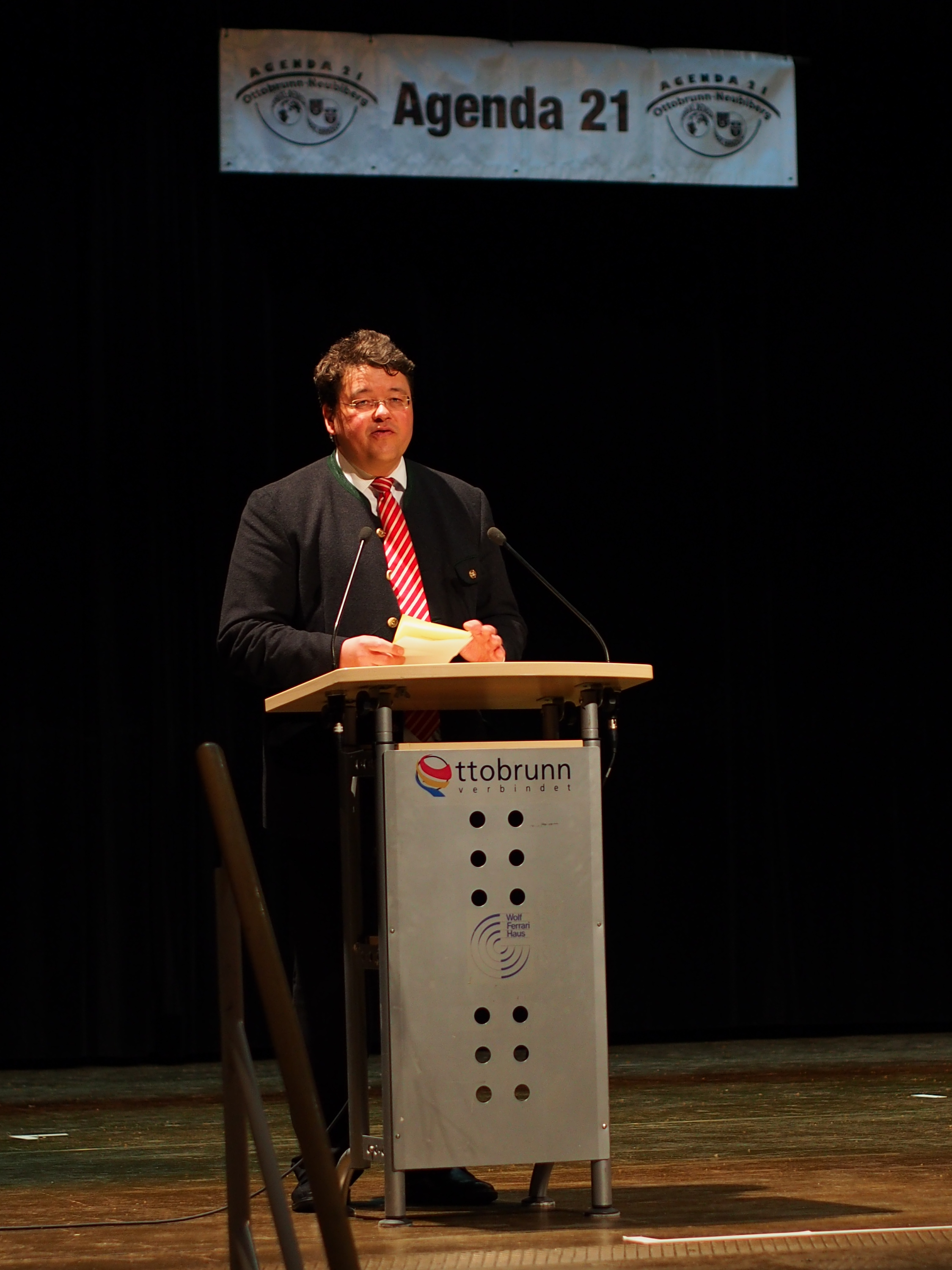 Thomas Loderer; CDU; Bürgermeister Ottobrunn Aufnahme vom Fest der Kulturen im Wolf-Ferrari-Haus in Ottobrunn